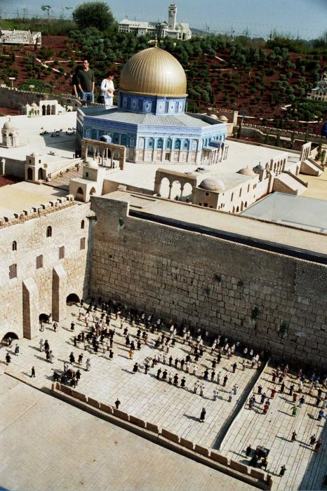 Parc Mini-Israël - maquette du Mont du Temple